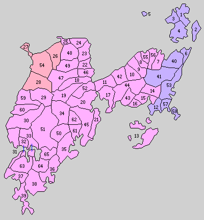 熊本県天草郡の町村制時点の町村。